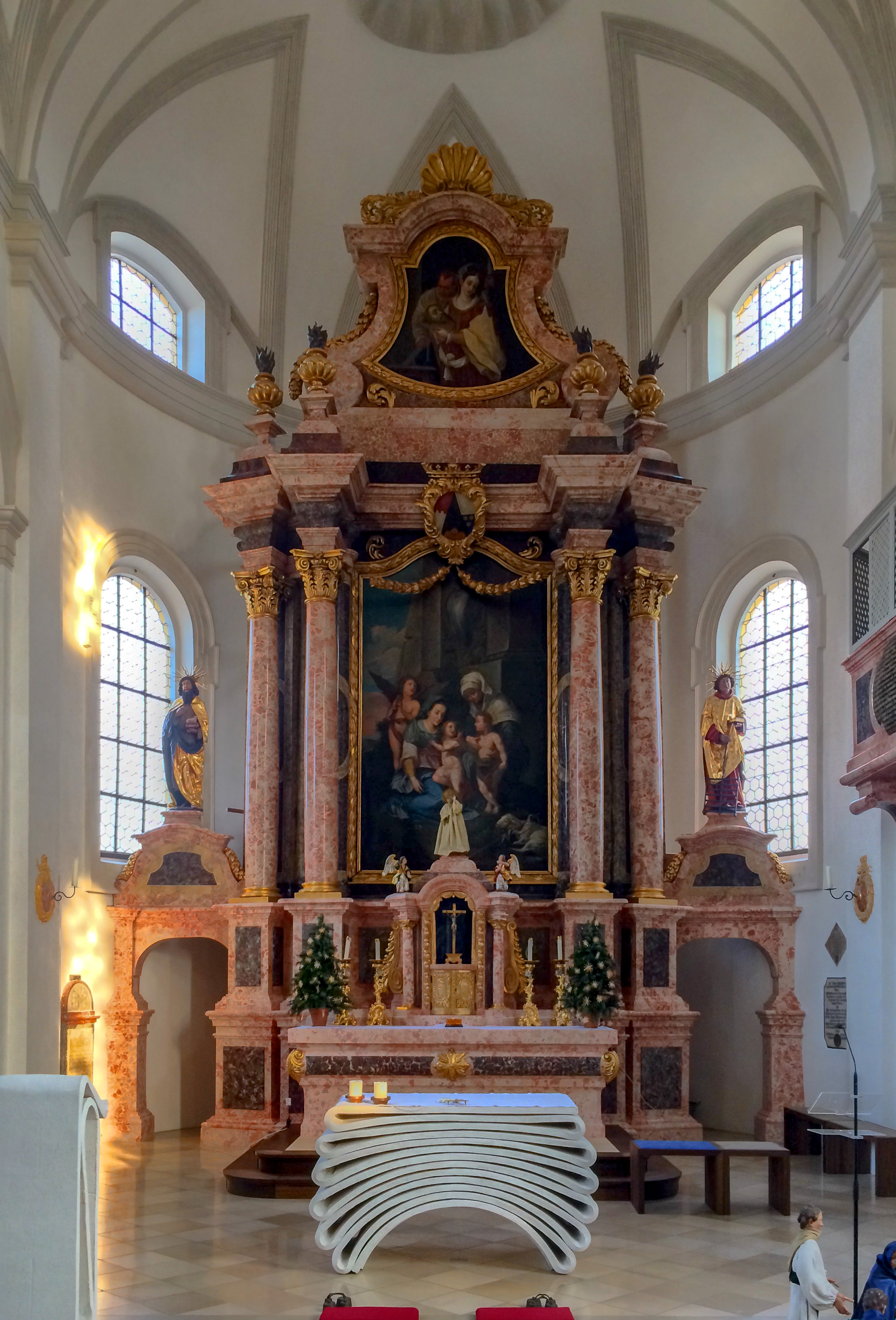 Hoch- und Volksaltar der Pfarrkirche St. Johann Baptist in Eching bei Landshut